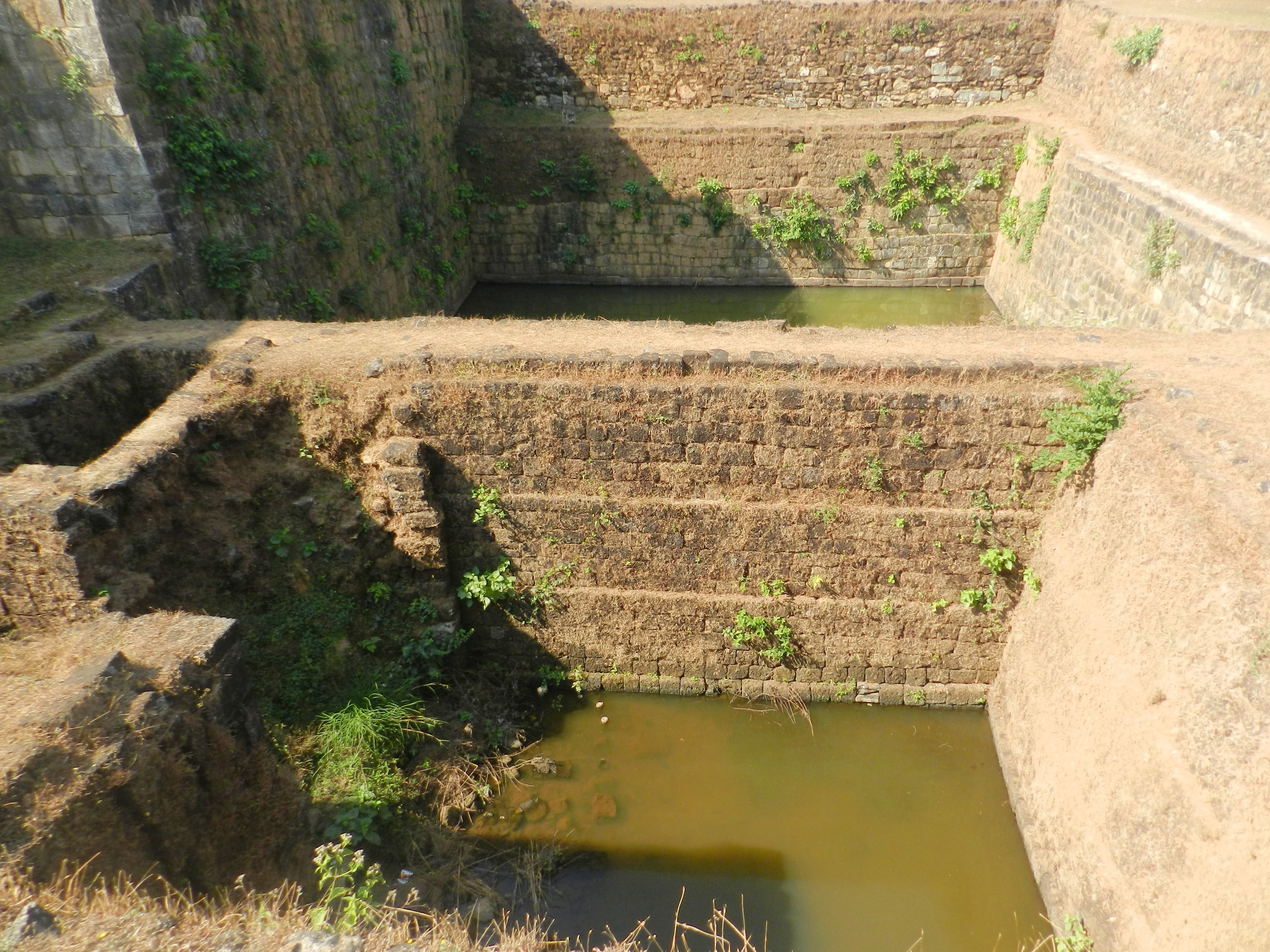 ಕನ್ನಡ: ಕೋಟೆಯೊಳಗಿರುವ ಕೊಳಗಳು